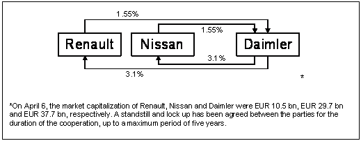 actionnariat Daimler AG, Alliance Renault-Nissan